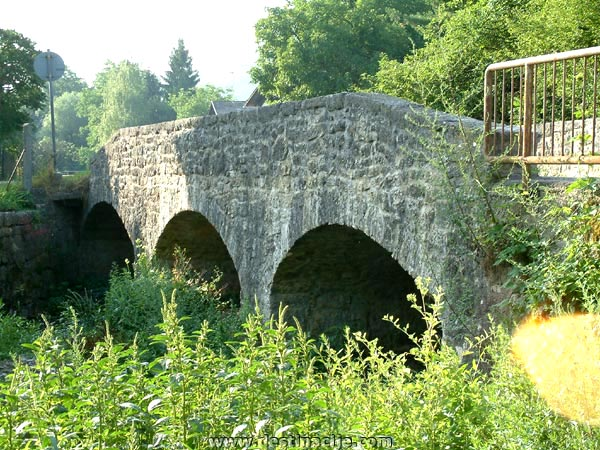 Kamniti most v Podbočju - obokan - tehnična dediščina